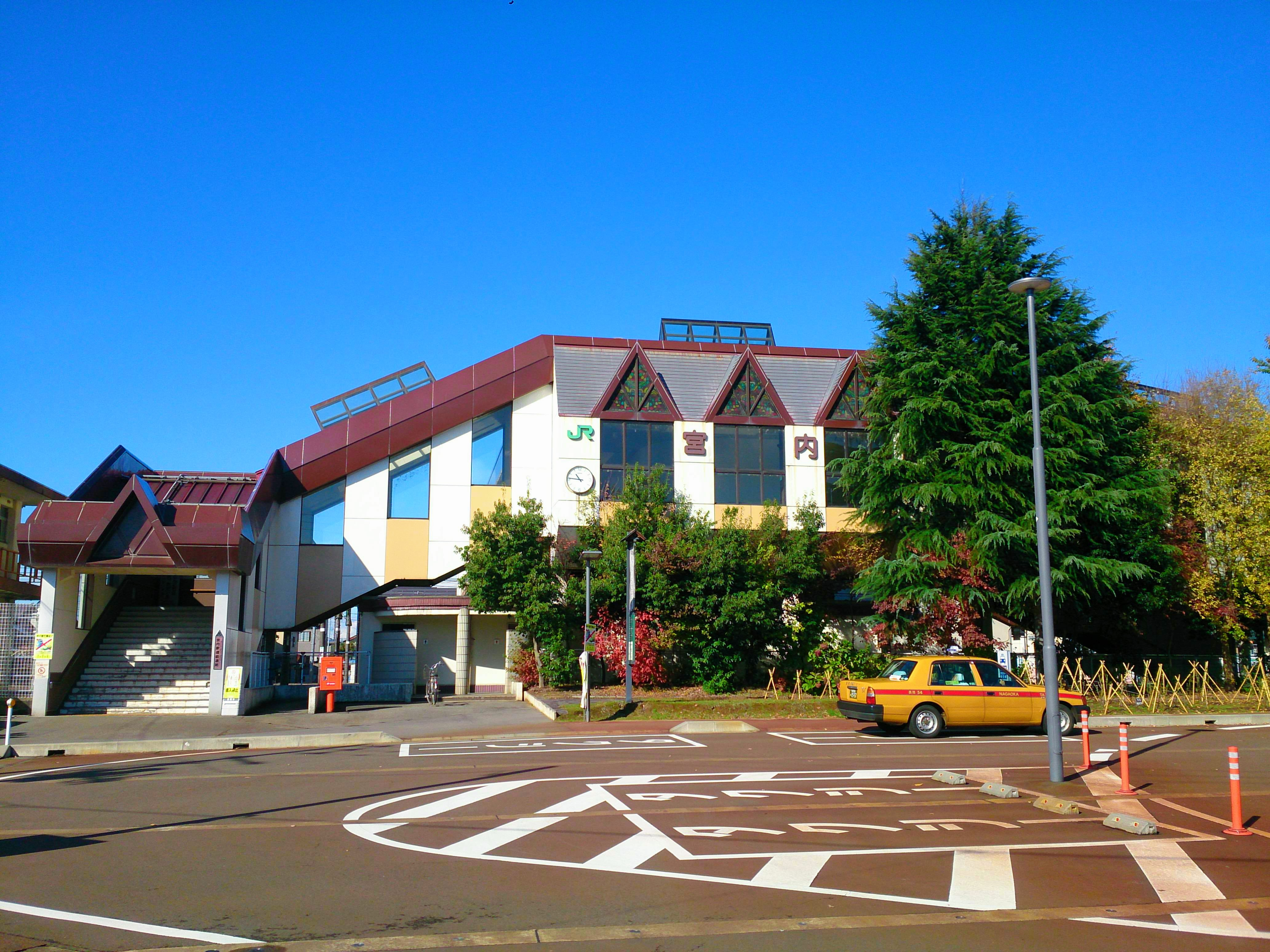 宮内駅の東口駅舎、駅前広場整備後